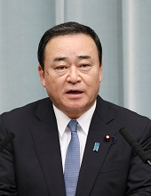 日本内阁府特命担当大臣梶山弘志